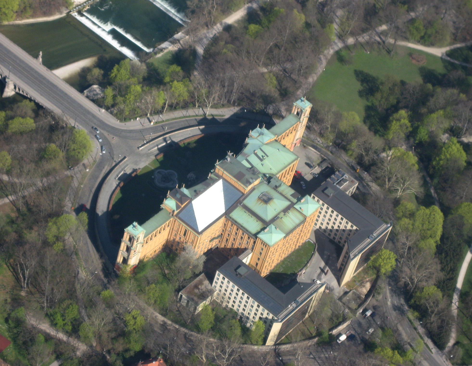 Luftbild vom Maximilianeum in München